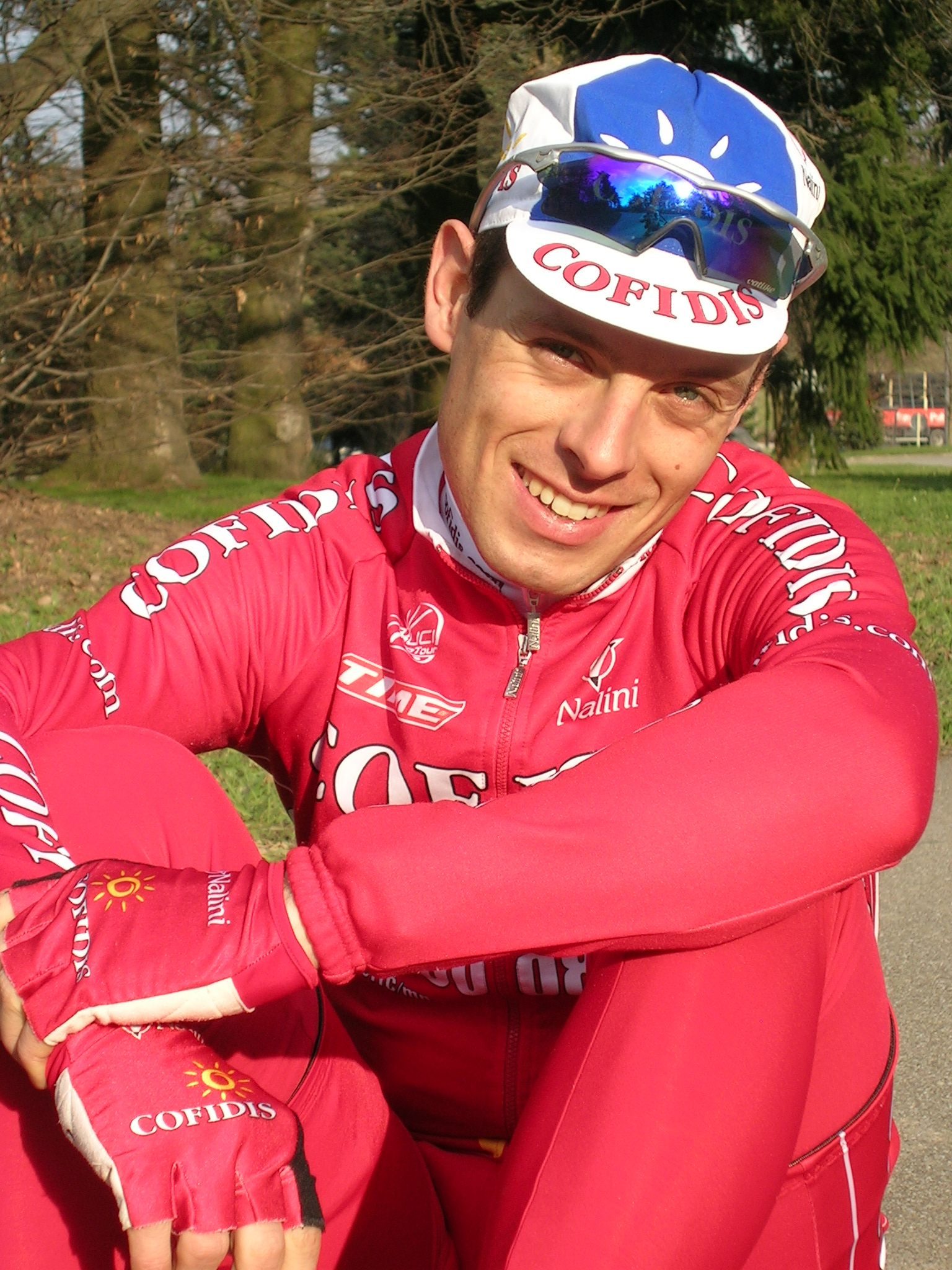 portrait de Mickael Buffaz